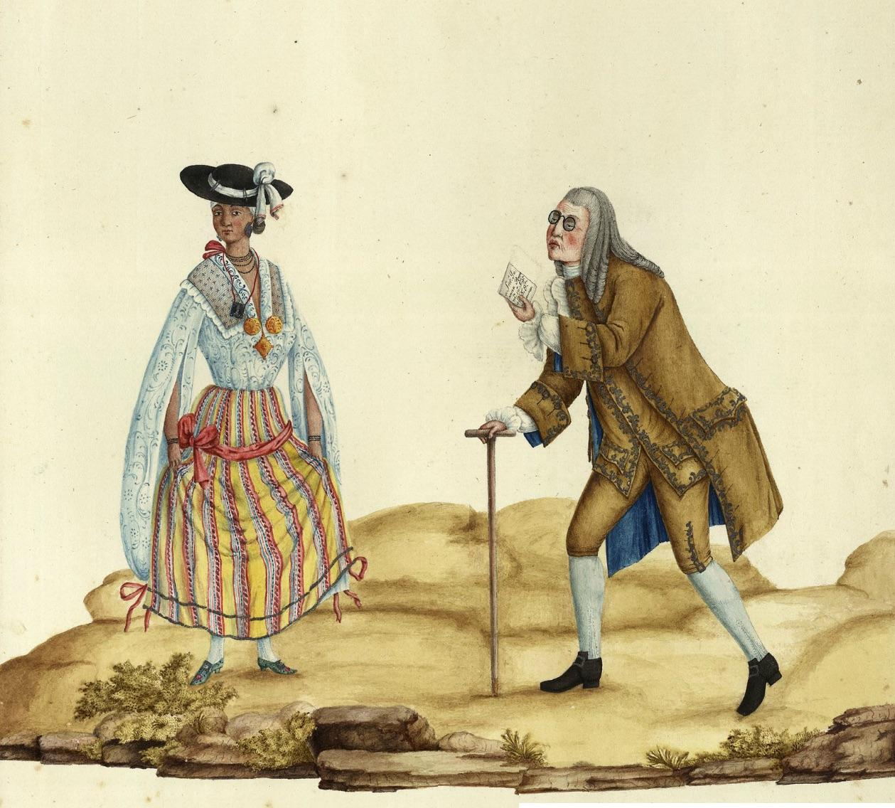 Homem do Brasil colonial entregando carta de amor à uma jovem mulata.